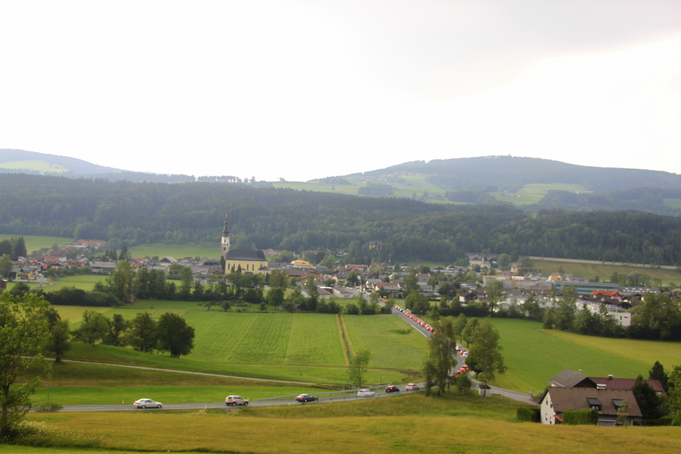 Thalgau, Austria